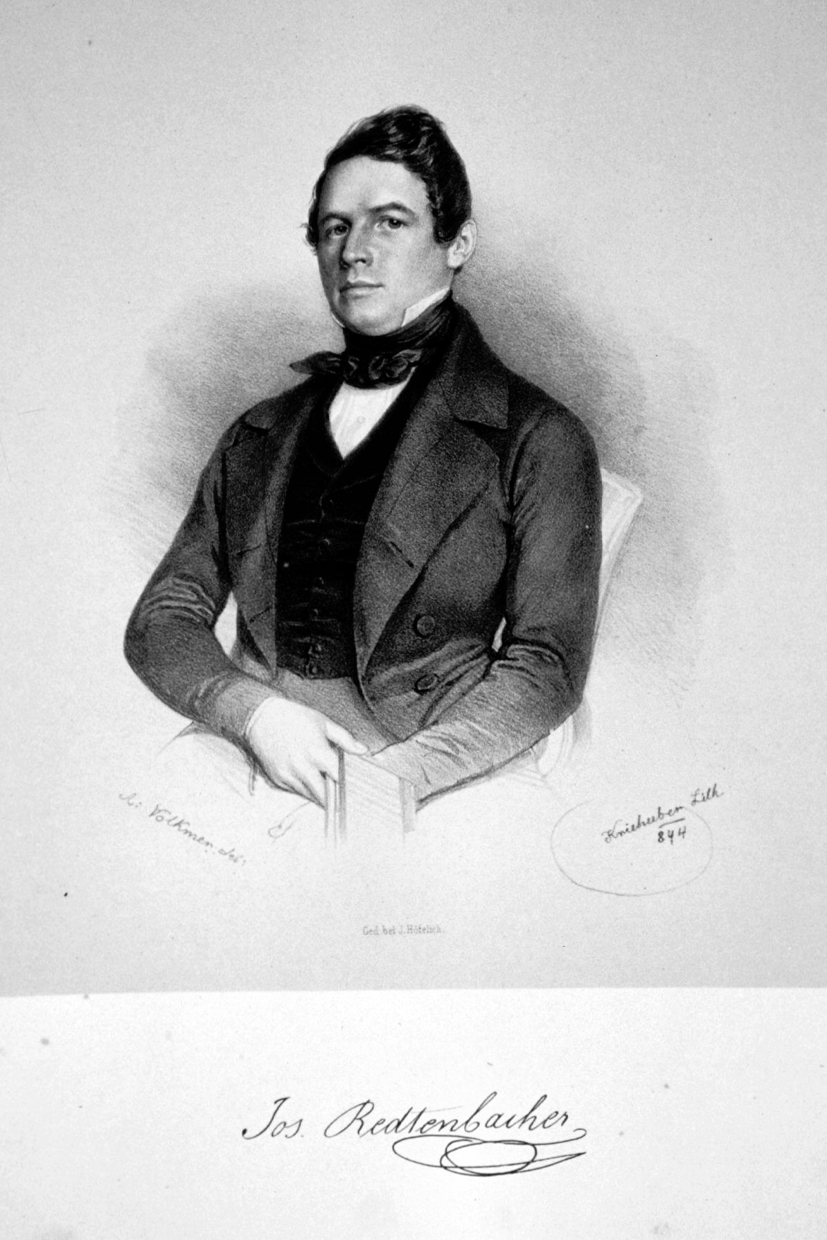 Josef Redtenbacher 1810-1870), Naturforscher, Chemiker.